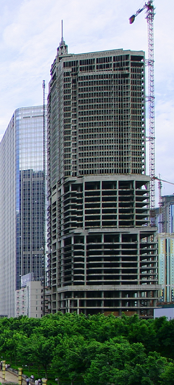 广州，东站广场